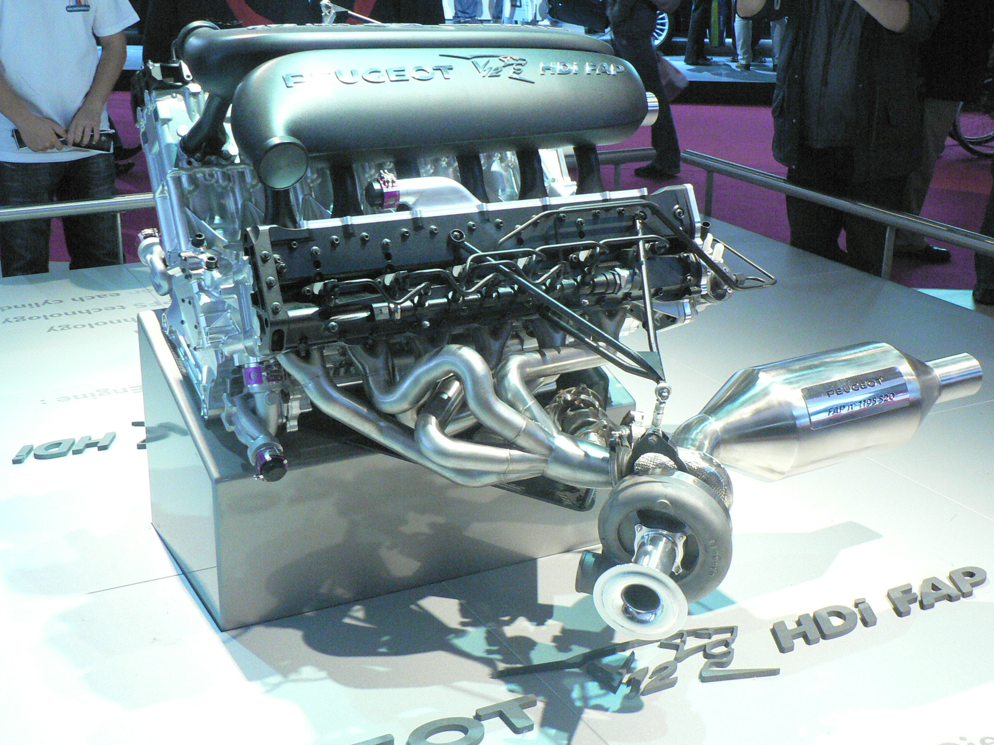 Mondial de l'automobile, Paris 2006